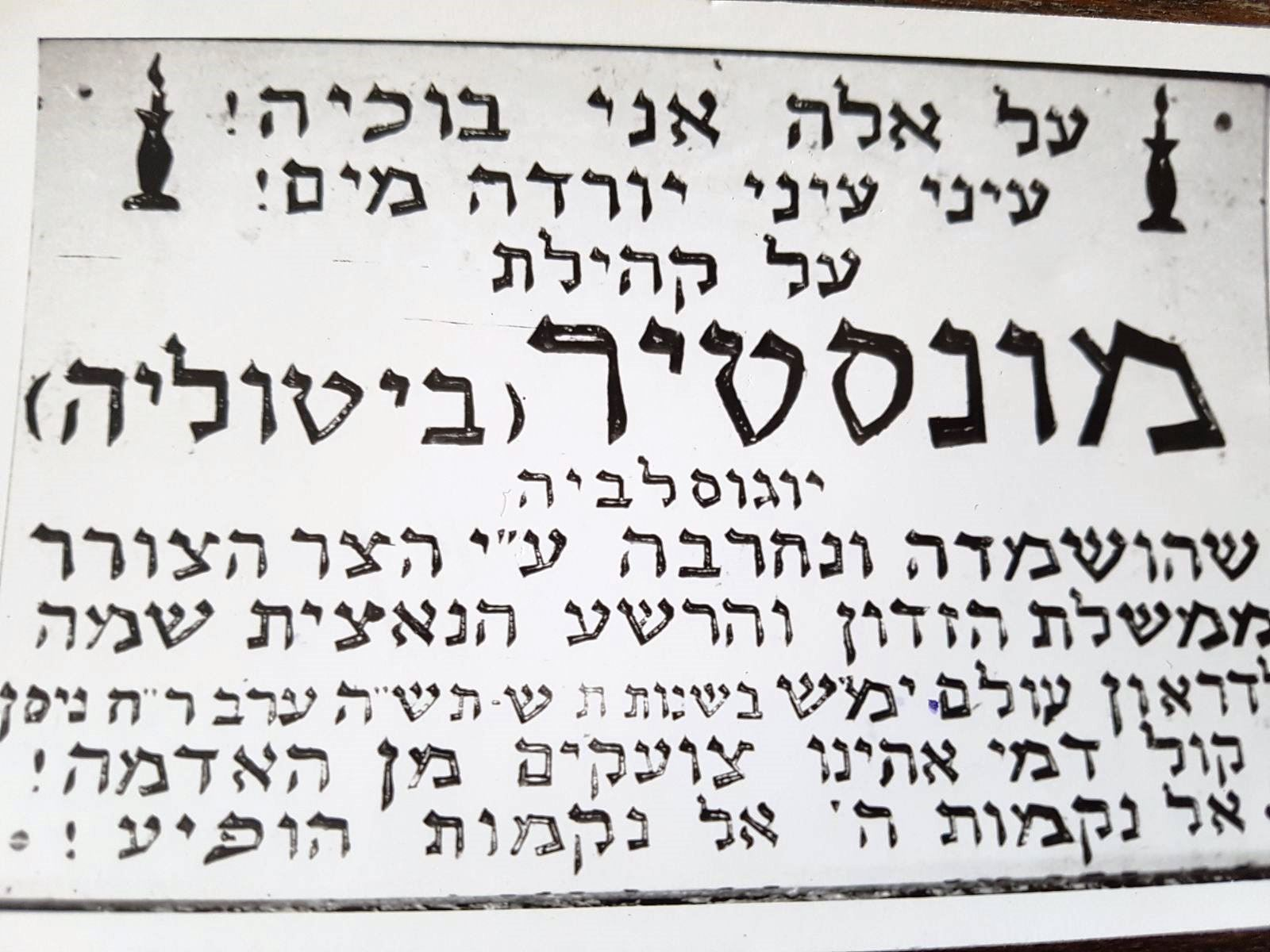 שלט הנצחה לקהילת מונסטיר שחרבה במונסטיר המצויה ב"מרתף השואה"